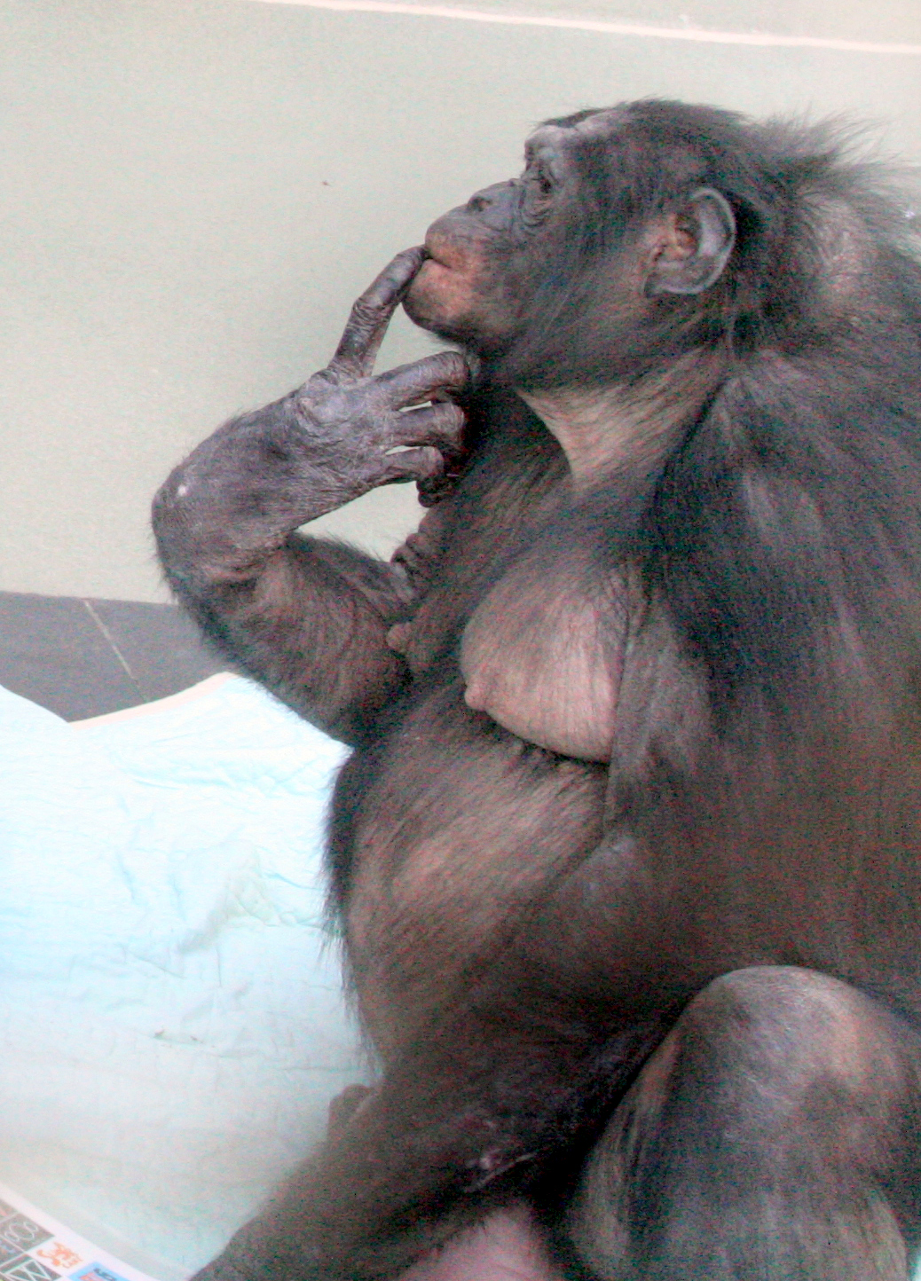 Panbanisha